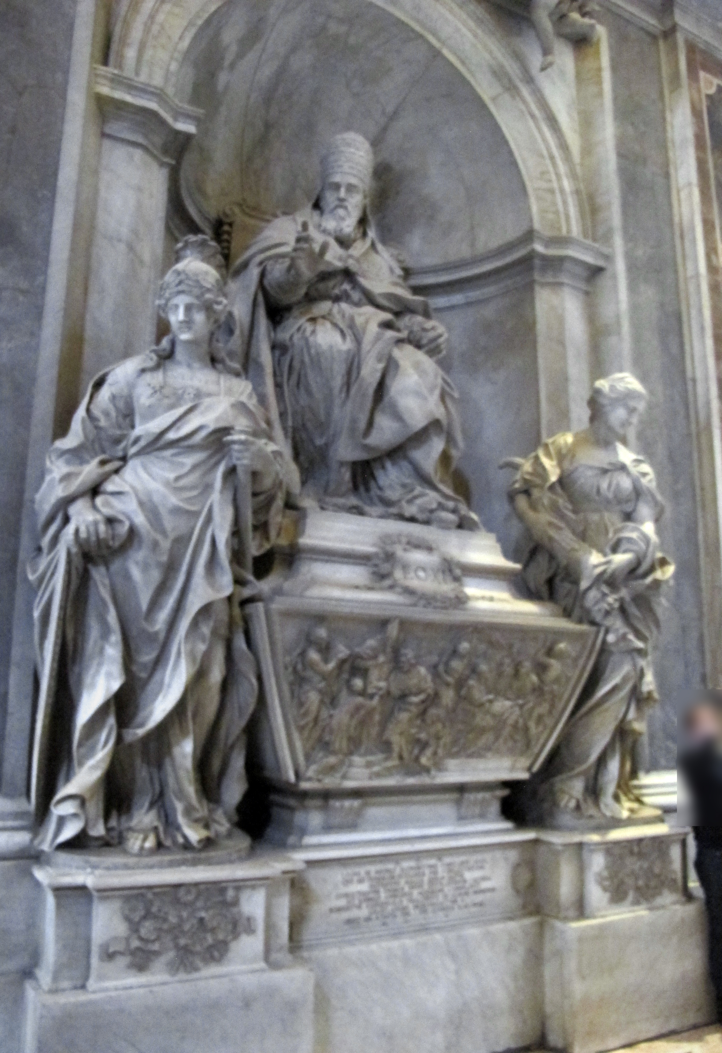 Basilica di San Pietro in Vaticano